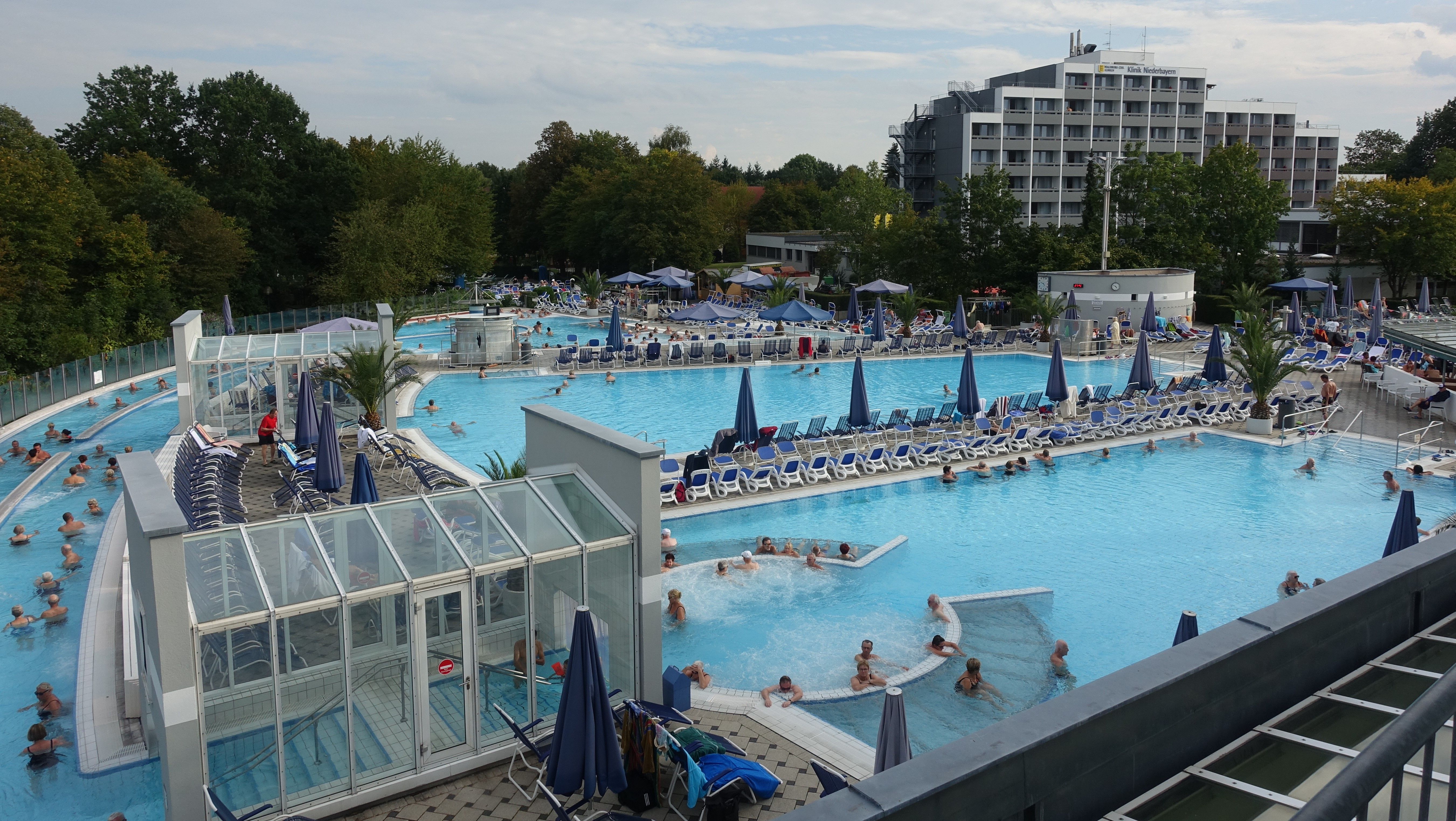 Europa Therme in Bad Füssing 2019: Bäder im Außenbereich